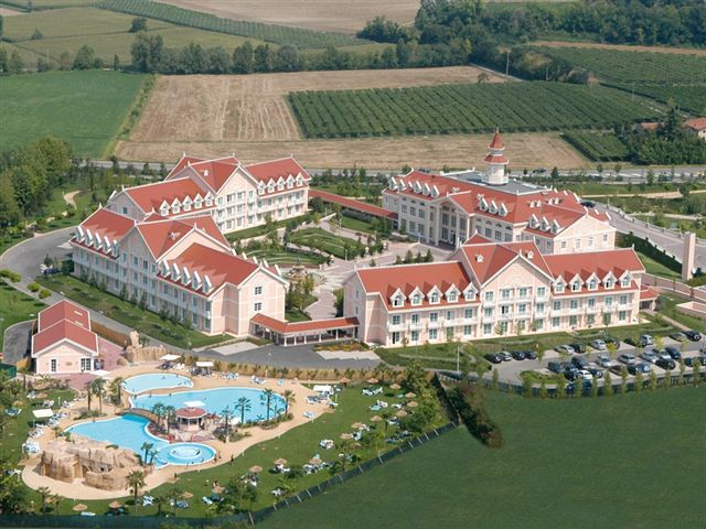 Foto aerea complesso Gardaland Hotel